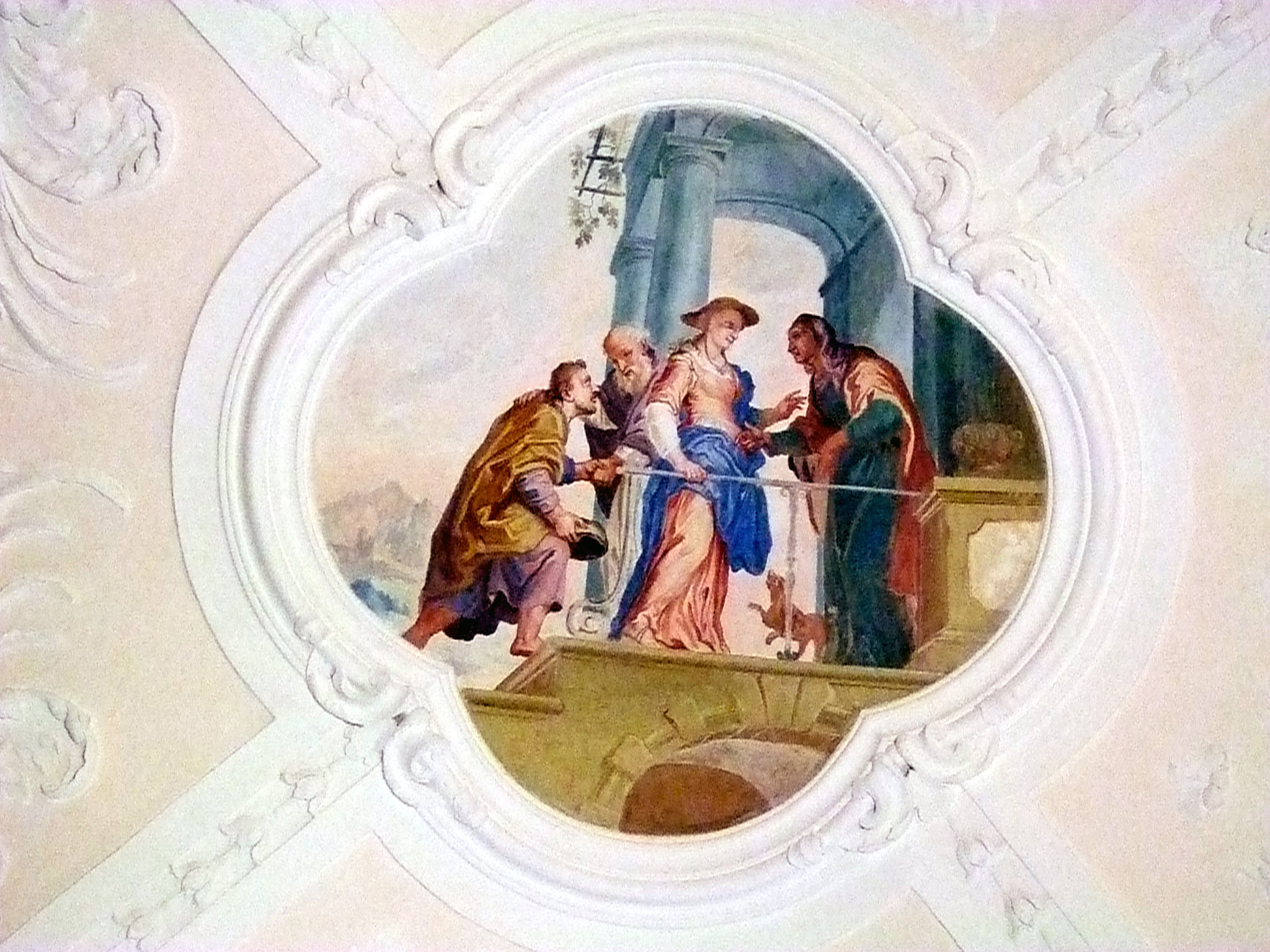 Fresko in der ehemaligen Klosterkirche der Kartause in Buxheim bei Memmingen - Google Maps - Google Earth